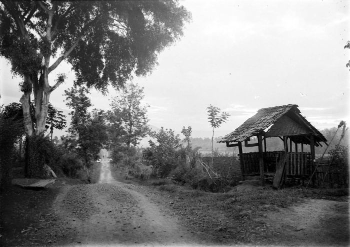 Negatief. Een wachthuisje (gardu) en waringinbomen langs de weg, Java